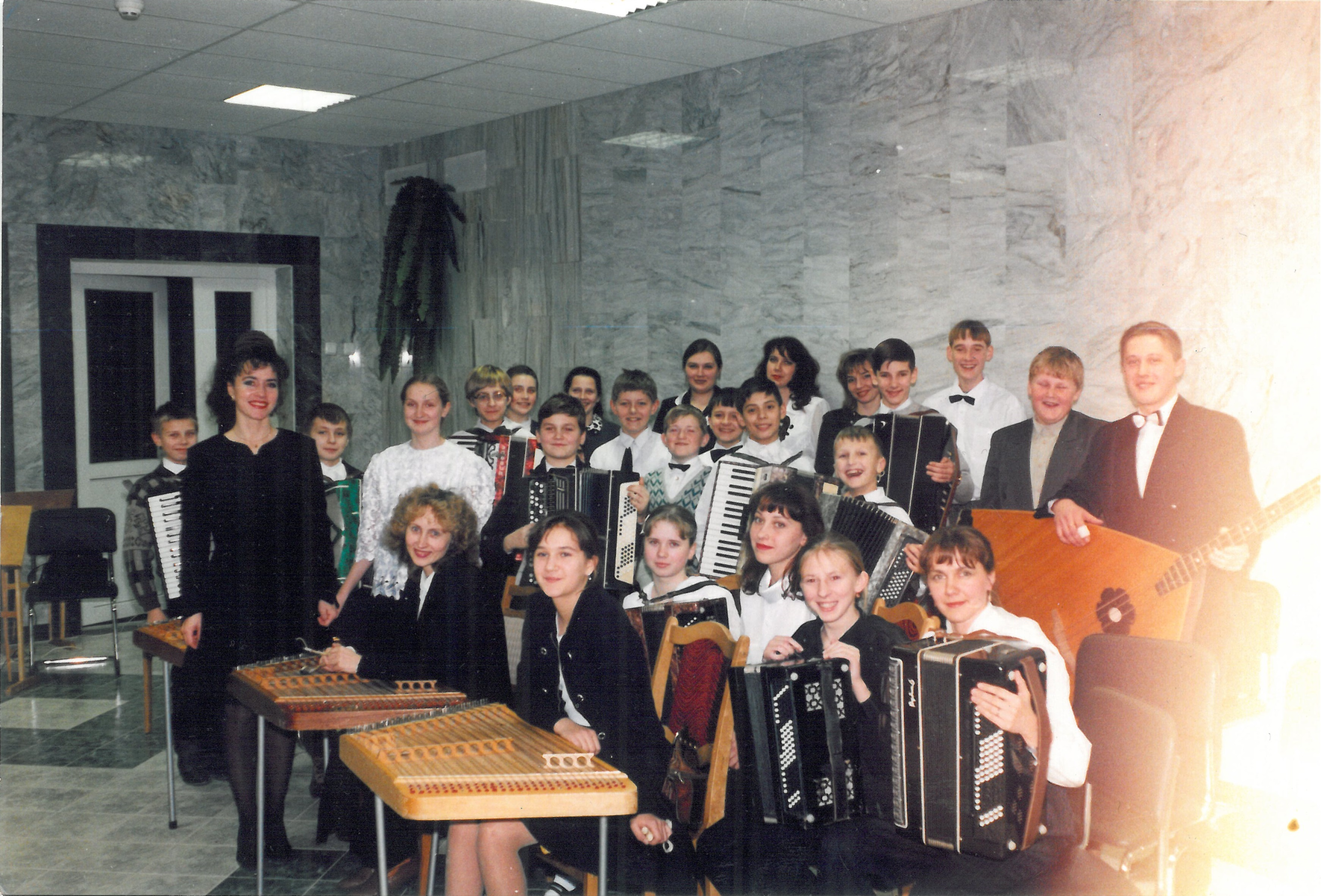 Аркестр Дружненскай дзіцячай школы мастацтваў, канец 1990-х. Дзень энергетыка, Мінская ЦЭЦ-5.